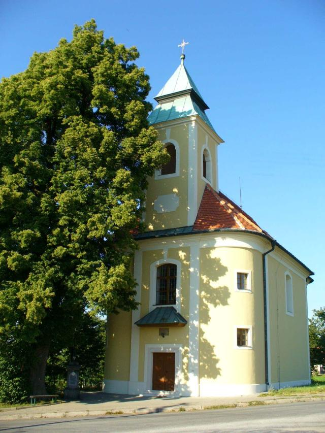 Bukovinka kostel